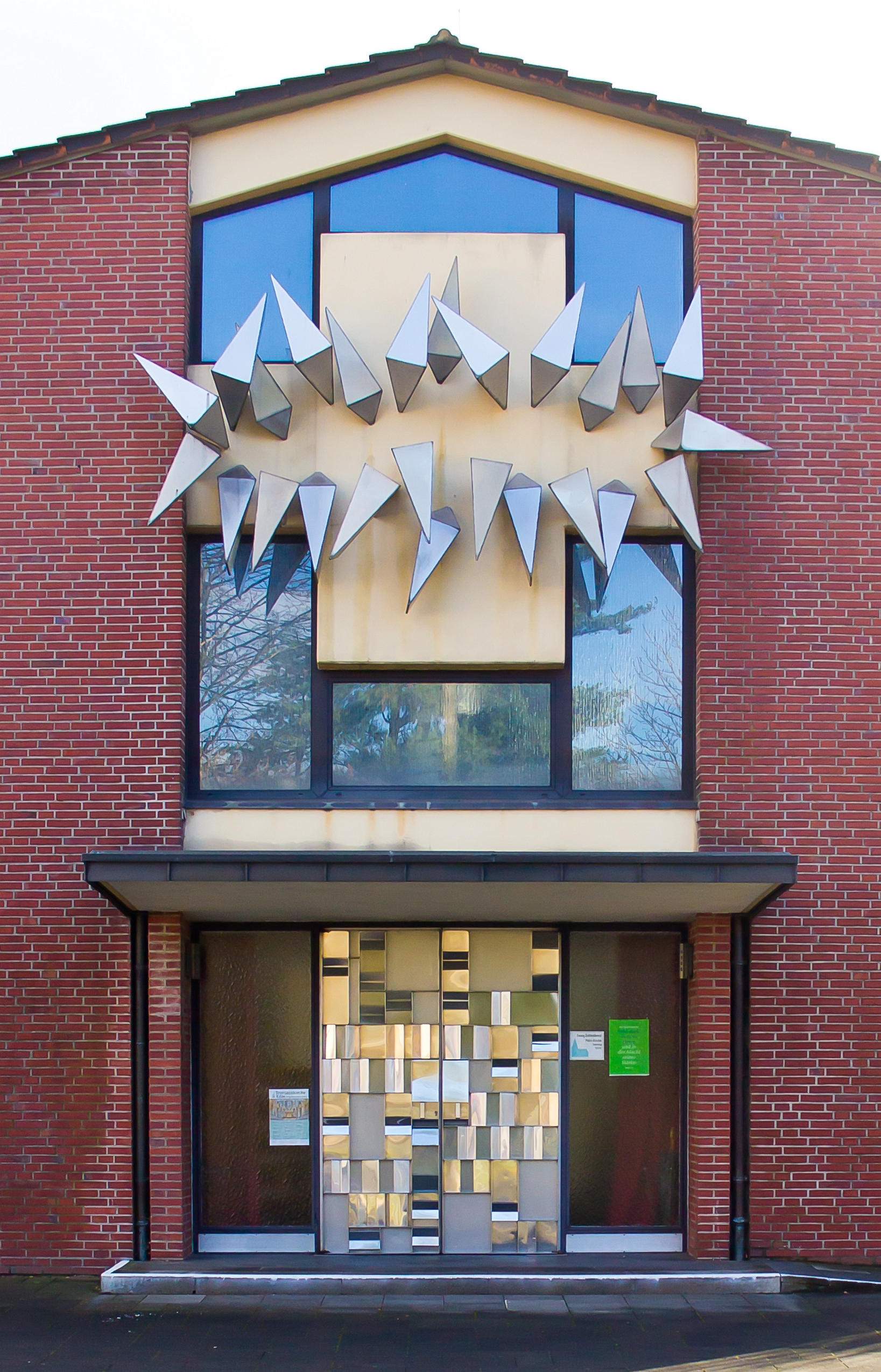 Evangelische Petrikirche, Quadrath-Ichendorf, Bergheim